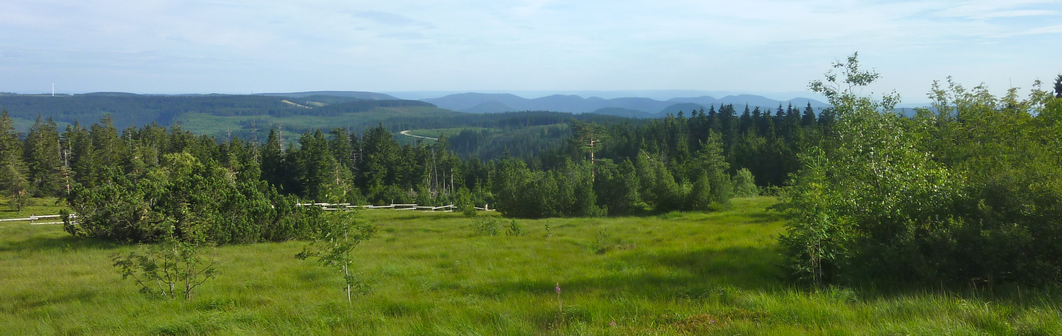 Schliffkopf: Blick nach Süden